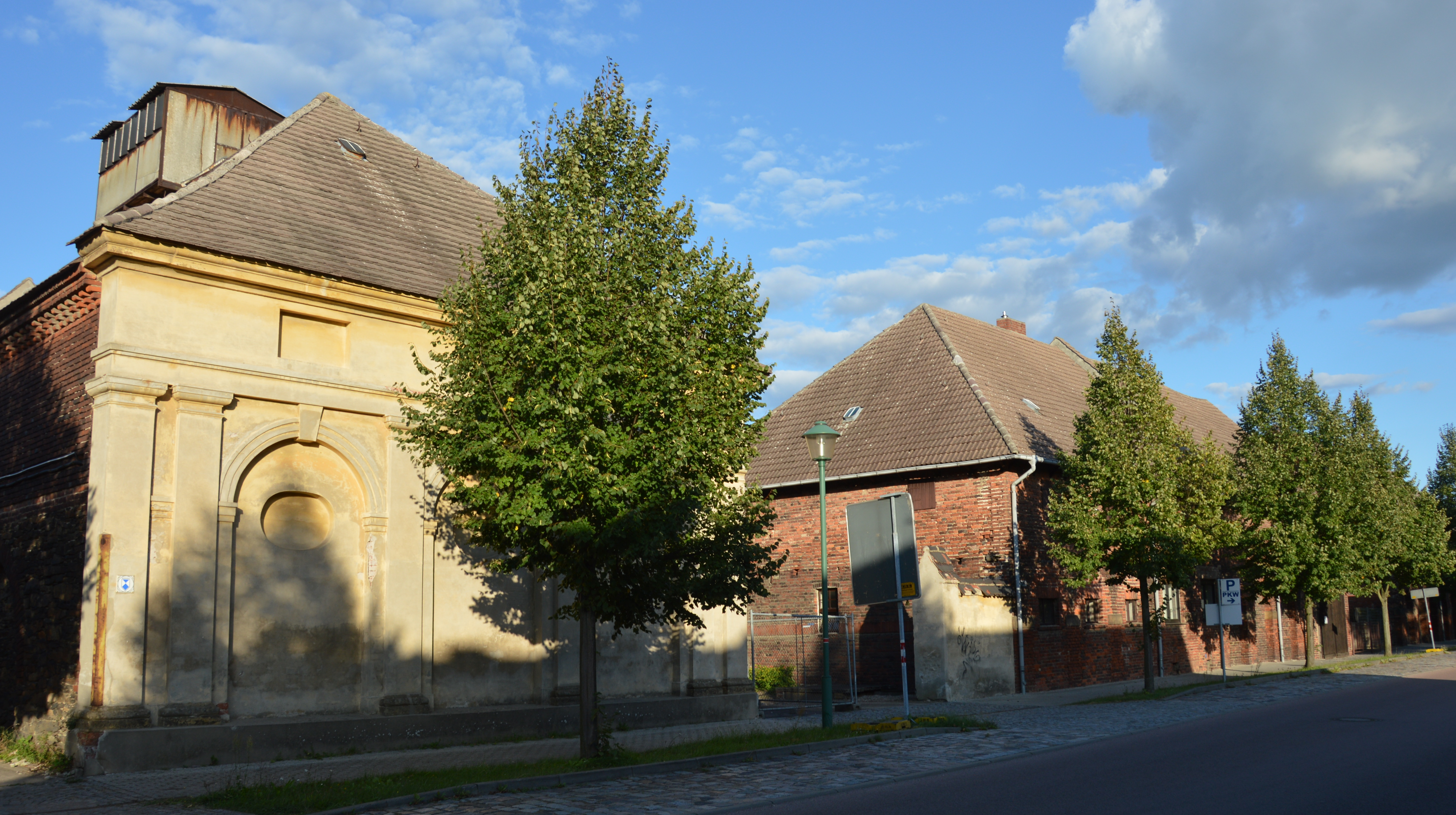 Haus Erdmannsdorfstraße 204 in Wörlitz